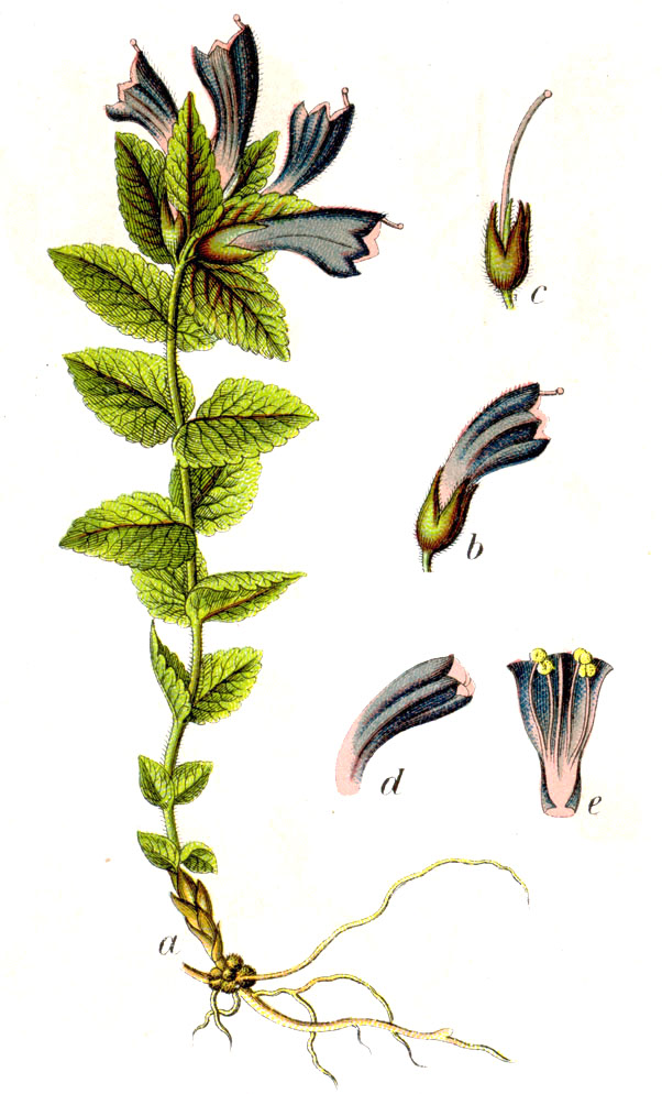 Bartsia alpina L. Original Description Bartschie, Bartsia alpina